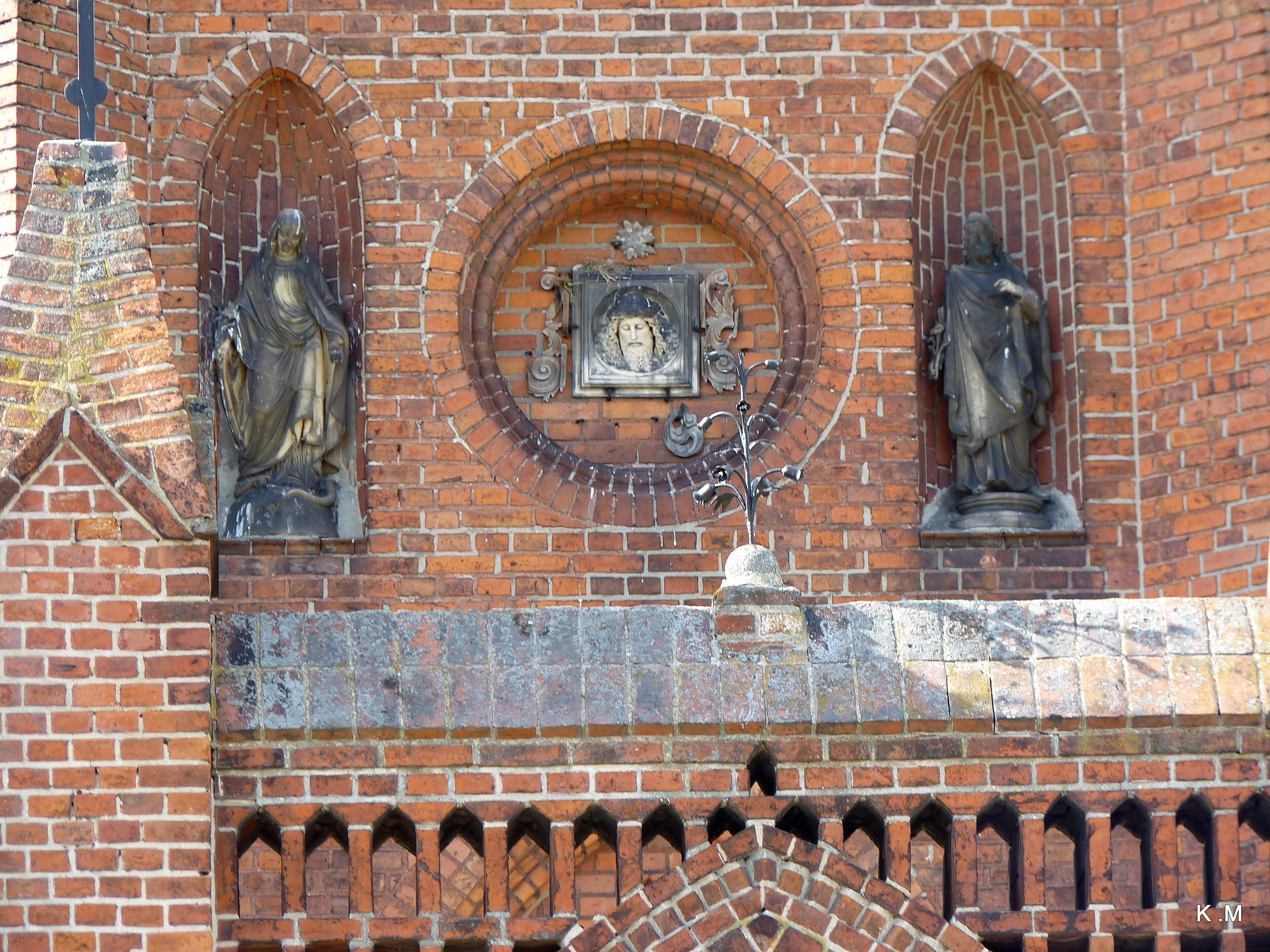 Zabartowo - kościół p.w. św. Jakuba, 1865-1866